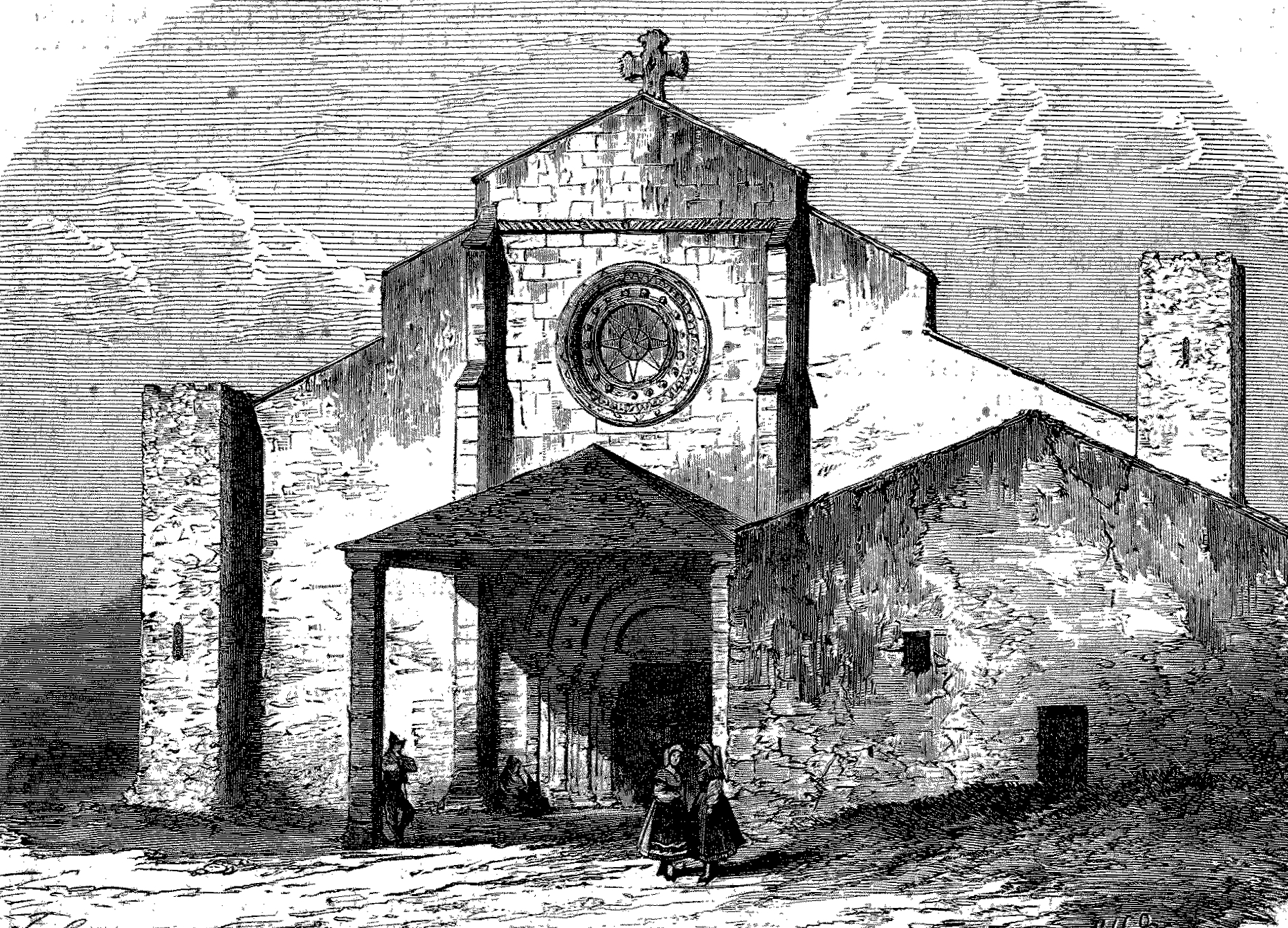 La Colegiata de Bayona. La ilustración gallega y asturiana, nº 24, 28-08-1880